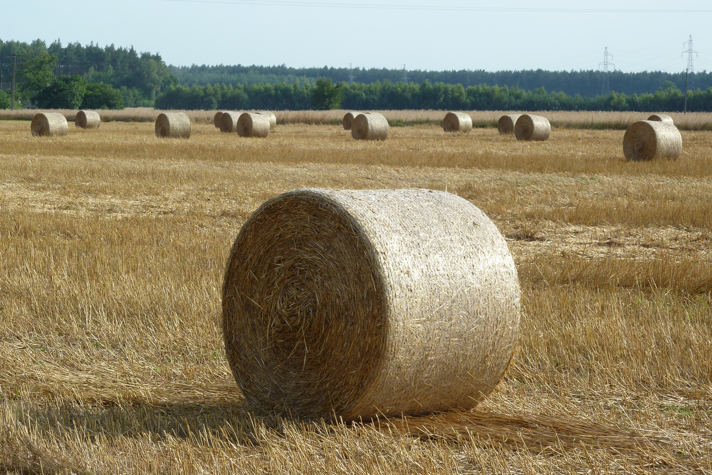 Zbalowana słoma, okolice wsi Staroźreby (powiat płocki).